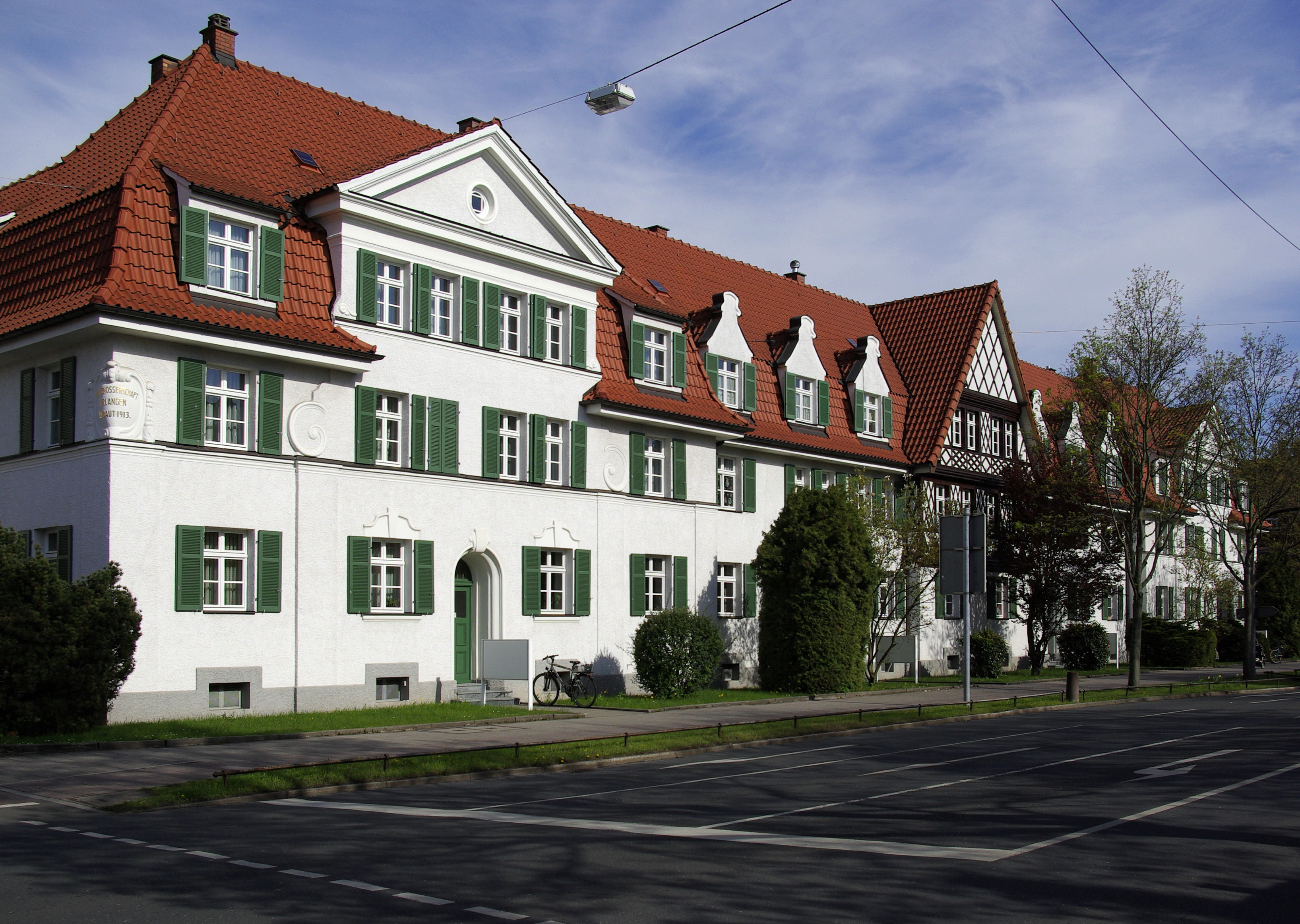 Baugenossenschaftssiedlung an der Nürnberger Straße in Erlangen, Nürnberger Straße 96-102.